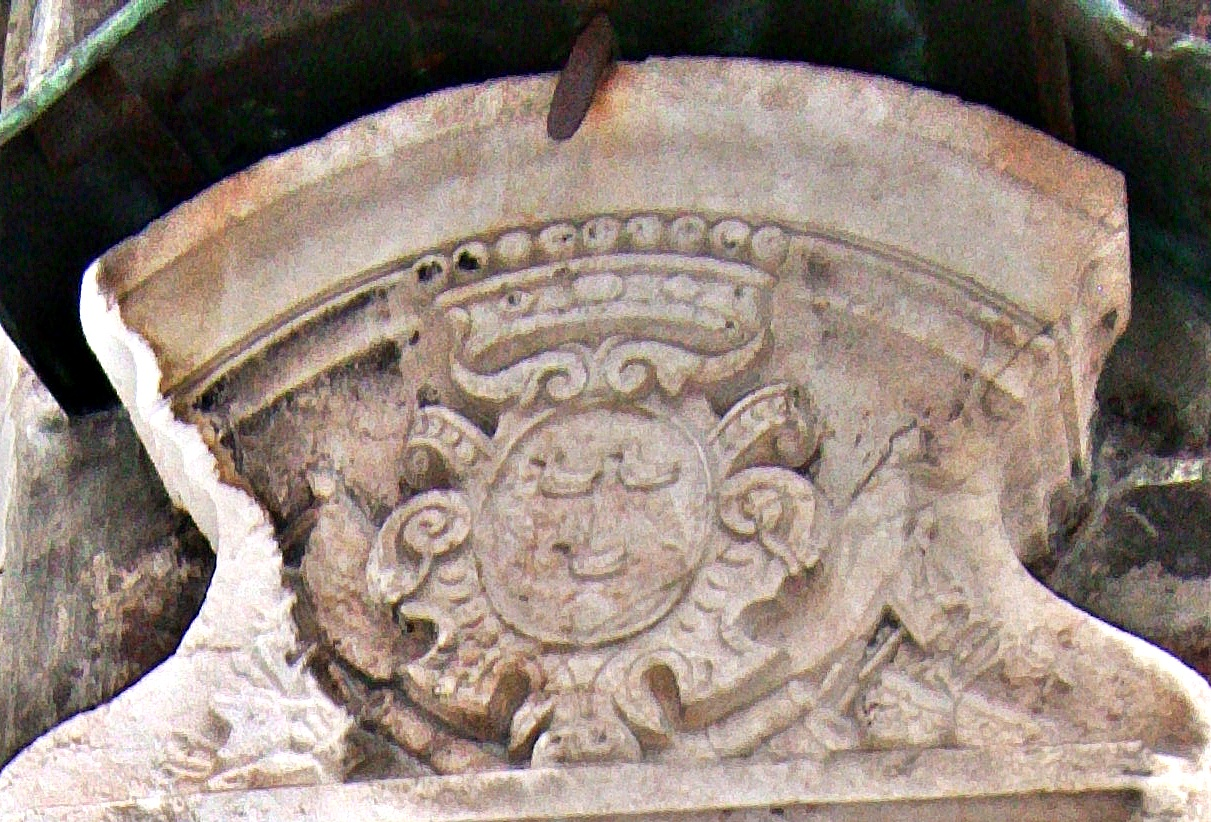 Heinrich Vambes de Florimont (1663-1752), Bayerischer Generalfeldzeugmeister, Detail vom Epitaph Frauenkirche München